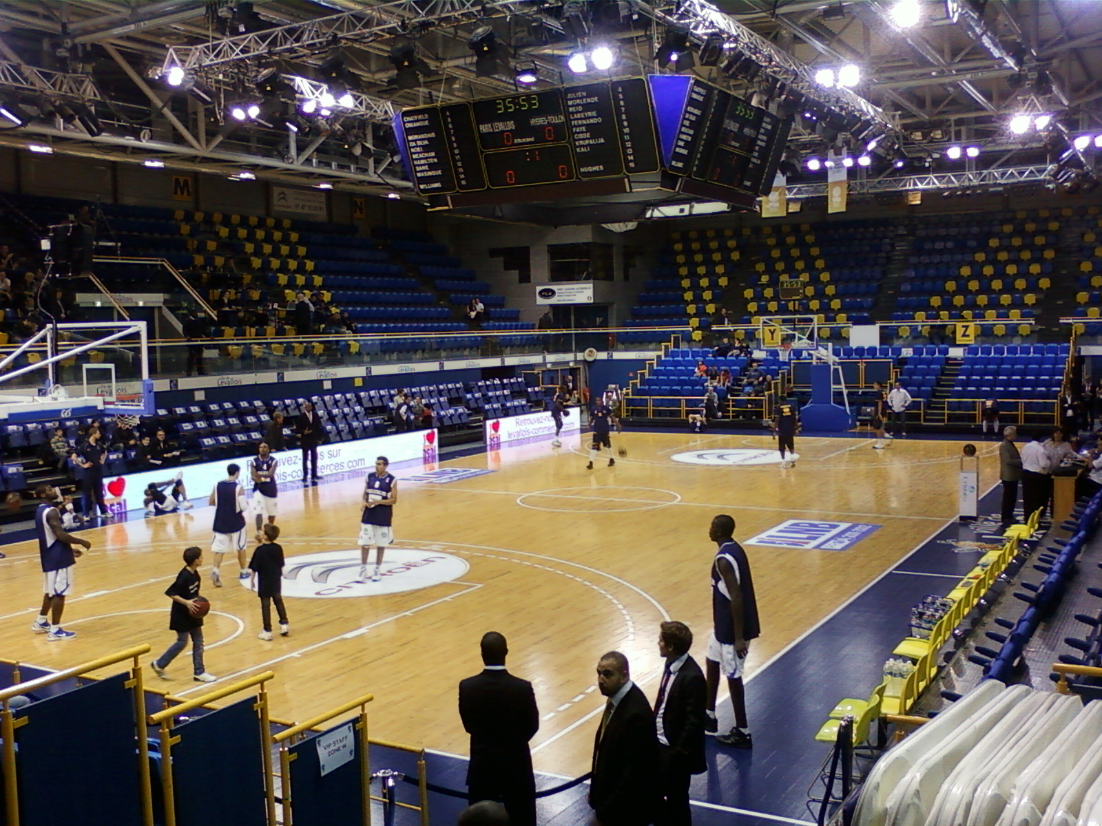 L'intérieur du Parc des sports Marcel-Cerdan de Levallois